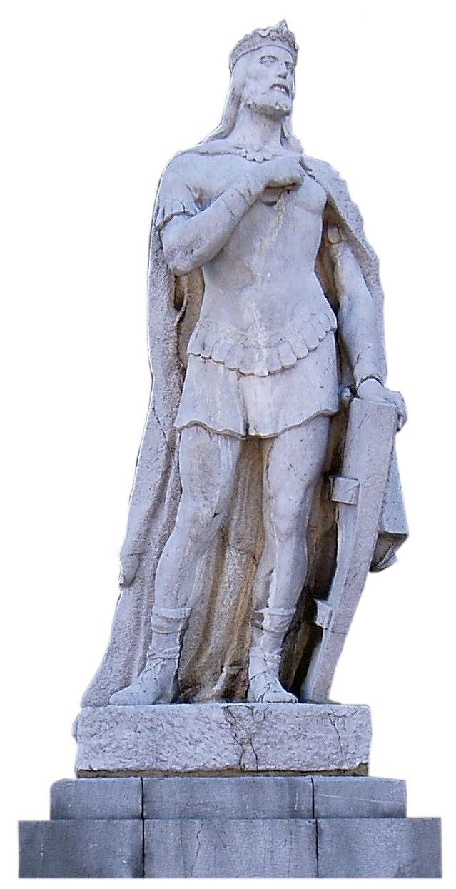 Estatua de Alfonso II el Casto, obra de Víctor Hevia. Situada a un lado del pórtico de la Catedral de Oviedo.